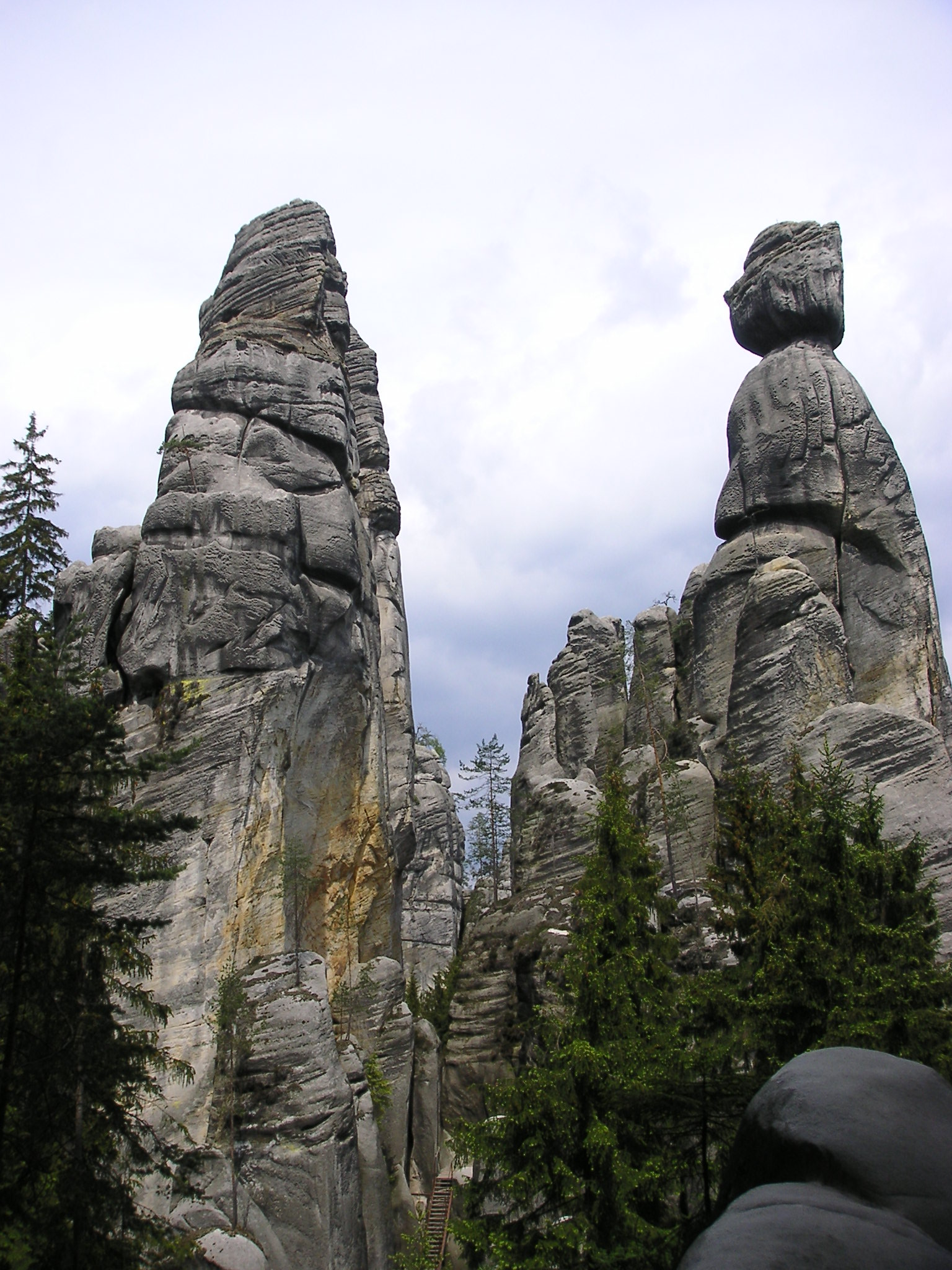 Aderspach, Felsformation "Herr und Frau Bürgermeister" siehe auch Bild:PICT0048.JPG